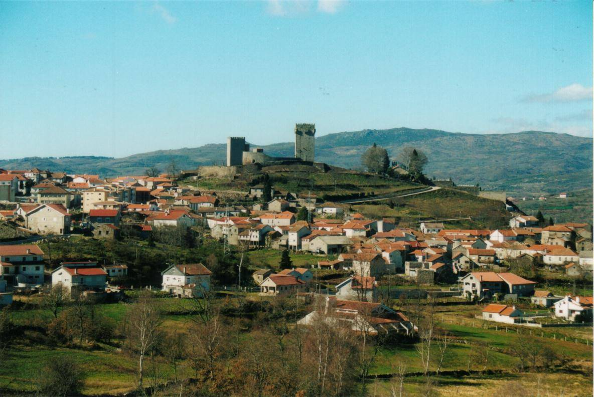 Vista do Castelo de Montalegre, Vila Real - Portugal.